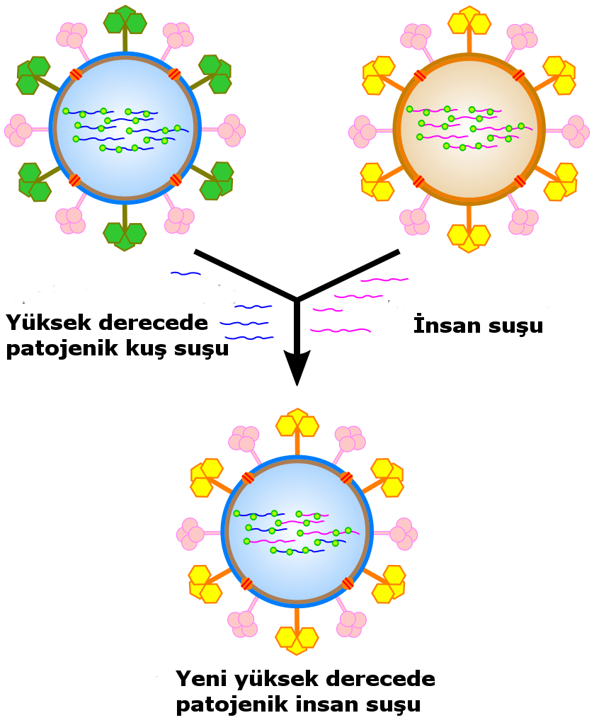 Antijenik değişim